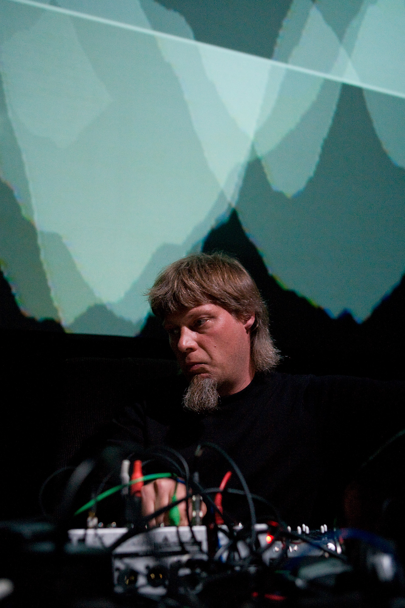 Ilpo Väisänen (Pan Sonic) photos by Randy Yau